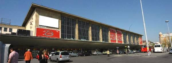 Wiener Westbahnhof